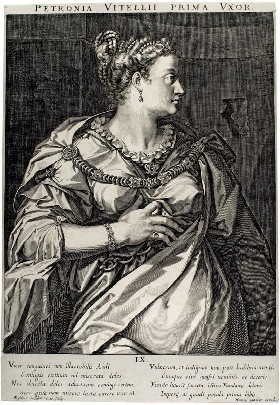 Petronia Vitellii Prima Uxor [Pl. IX]